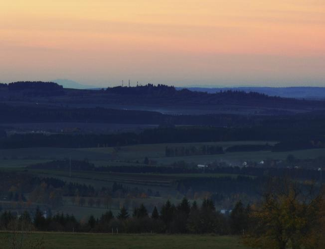 Rakouské Alpy viditelné z Kopečku u Studnic ve Žďárských vrších, vzdálenost mezi objekty a místem pozorování cca 205 km